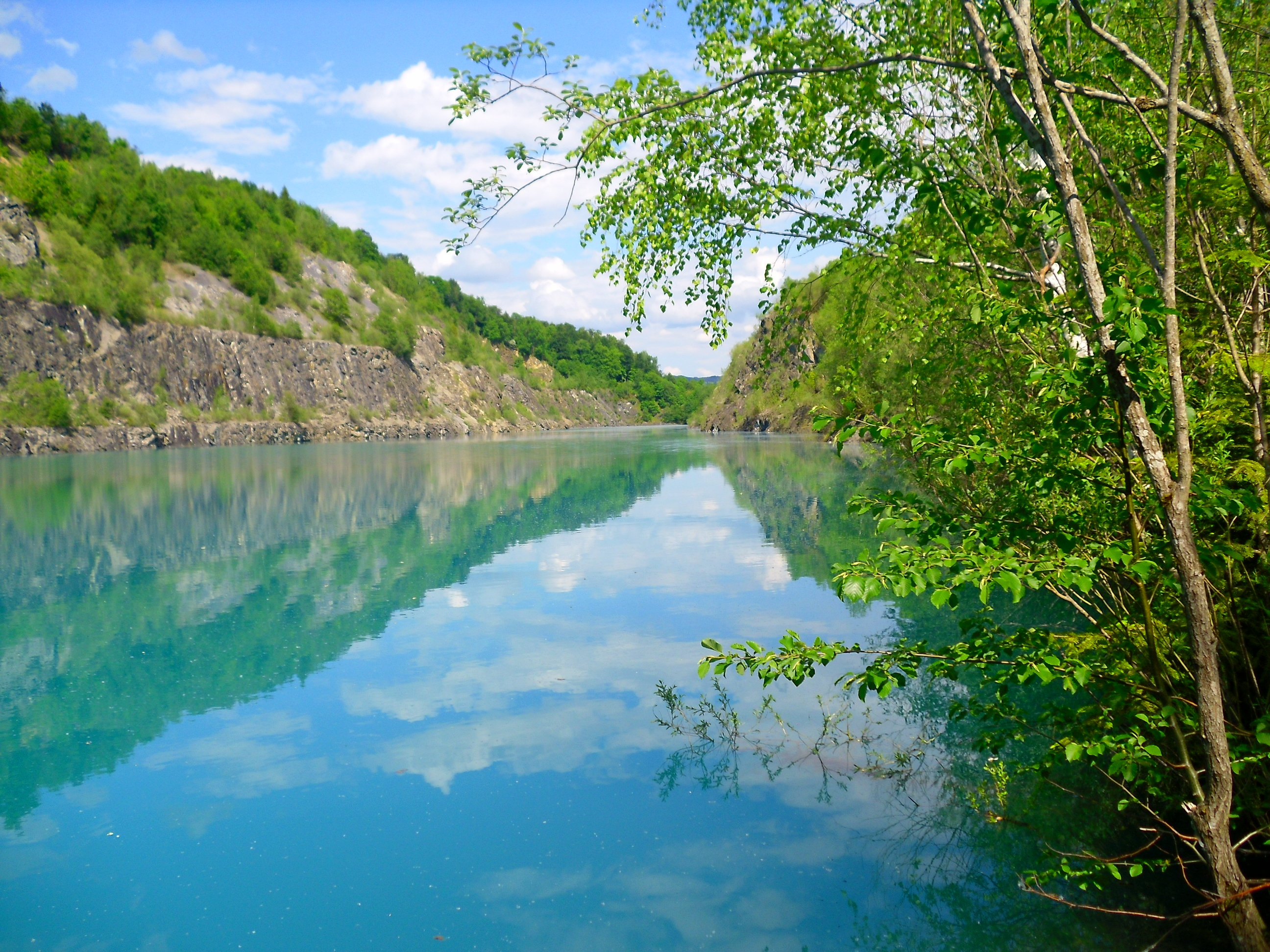 Langer Köchel, Murnauer Moos, ehemaliges Hartsteinwerk Werdenfels